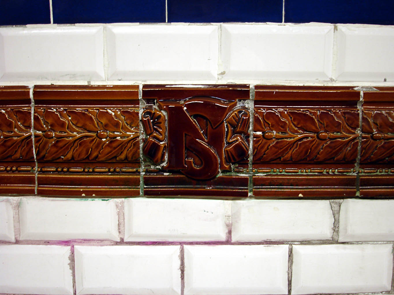 Verkachelung vom Typ "Nord-Sud" in der Station Liège der Pariser Metrolinie 13, Frankreich.